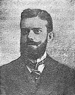 Político tradicionalista